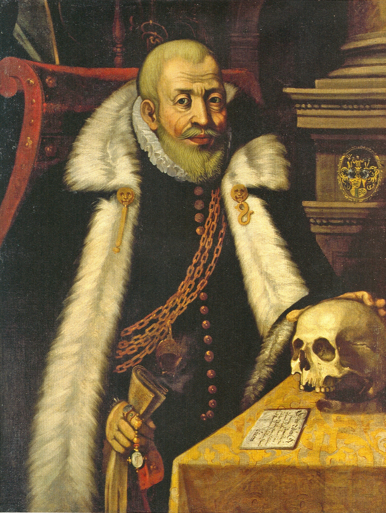 Ludwig Pfyffer von Altishofen auf einem Gemälde im Schloss Heidegg